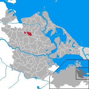 Wrangelsburg, Landkreis Ostvorpommern, Mecklenburg-Vorpommern